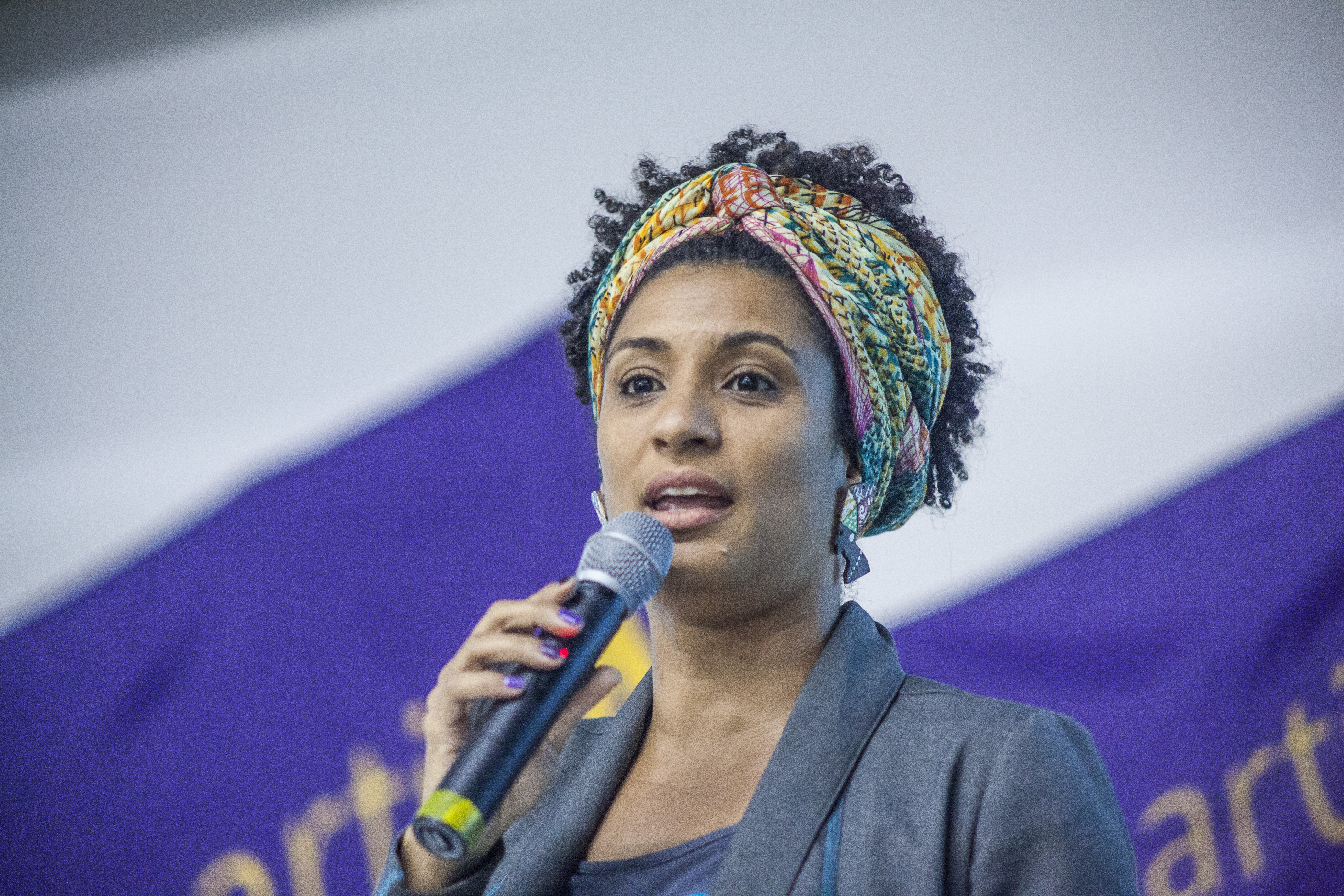 Luciana50 • Debate PartidA com Luciana Boiteux • 22/09/2016